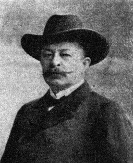 Österreichischer Politiker, Reichsratswahl 1907, Name siehe Dateiname